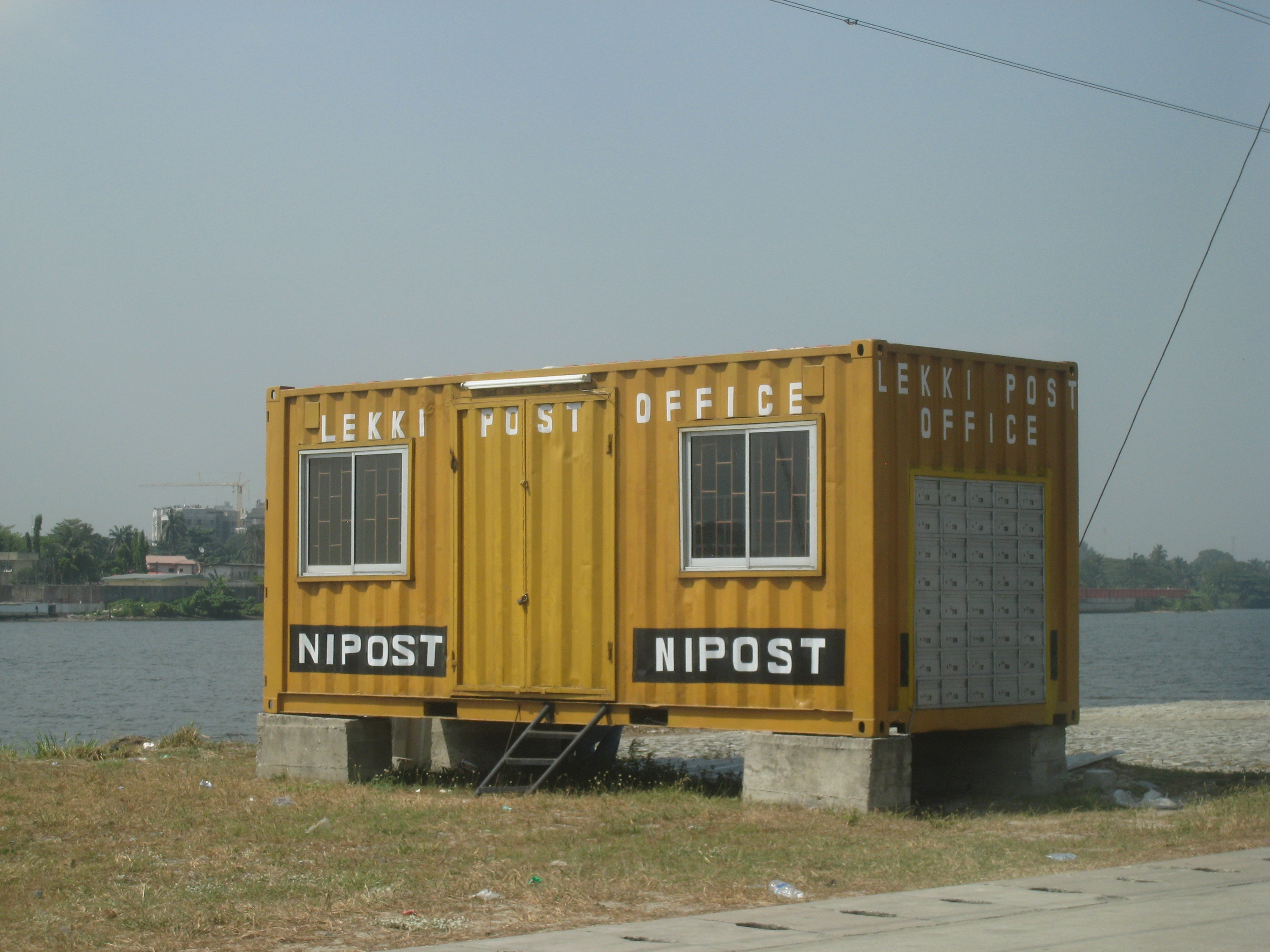 Lagos, Nigeria